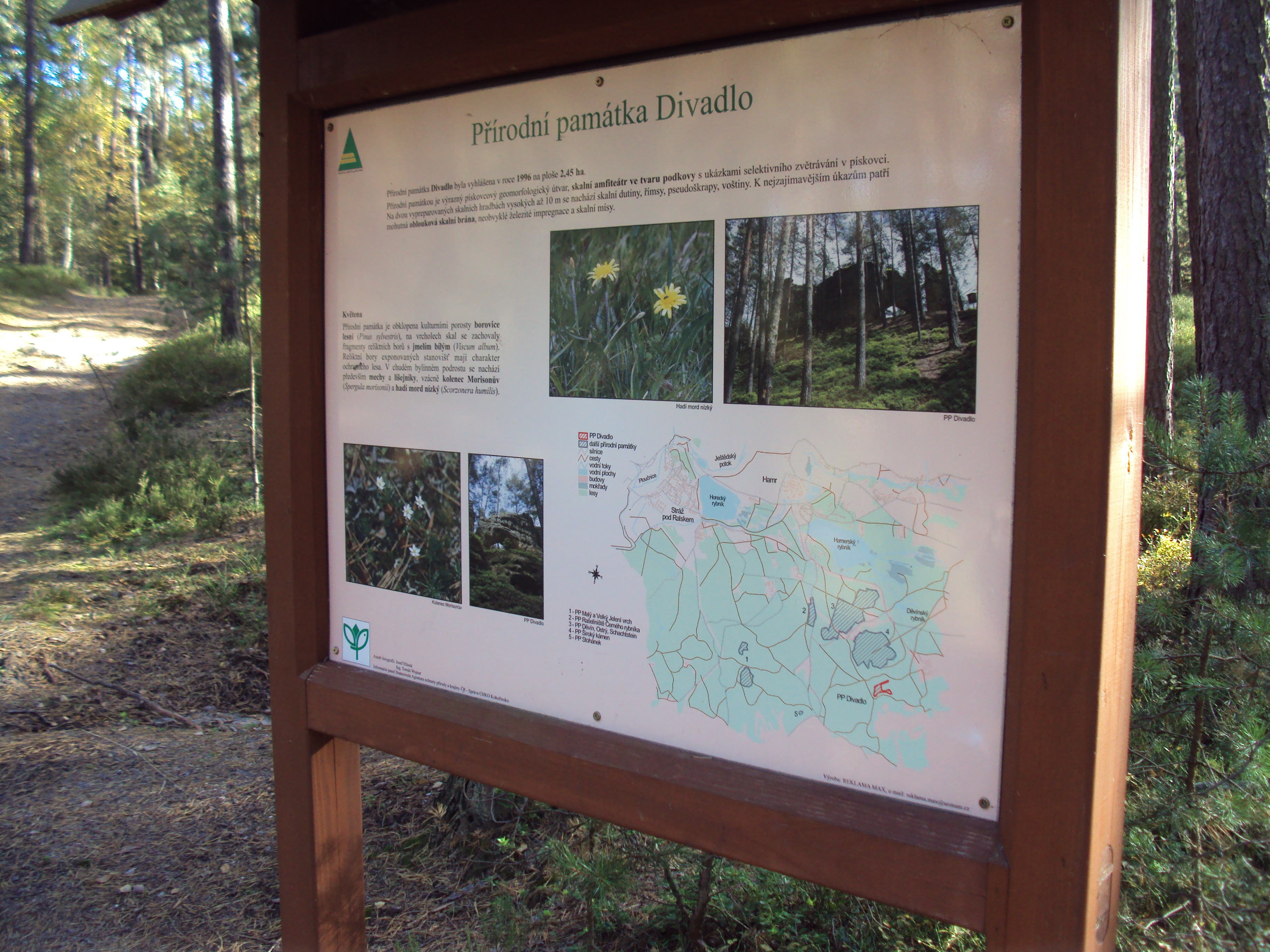 Přírodní památka Divadlo 4km JV od Hamr na Jezeře